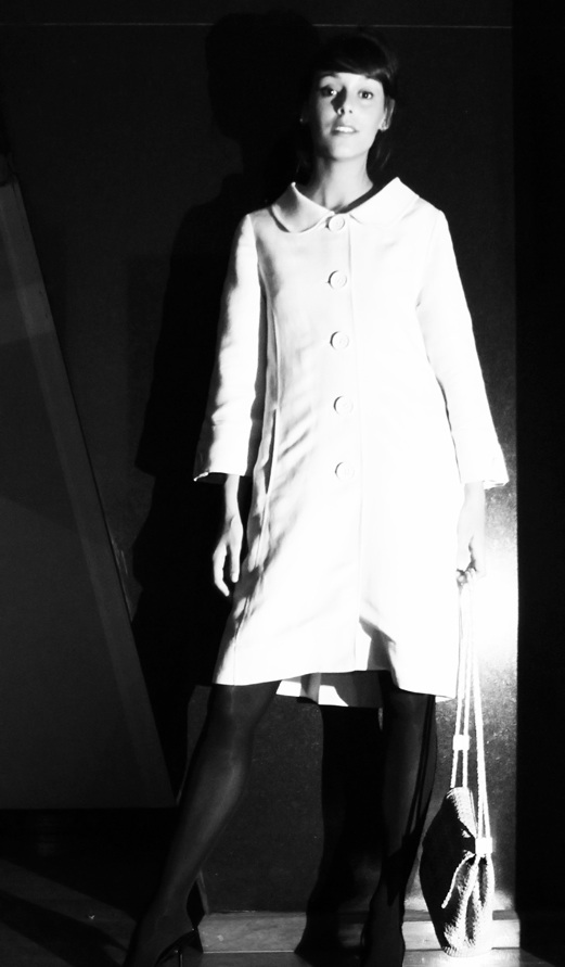 Fotografia de Belen Cuesta en 2007